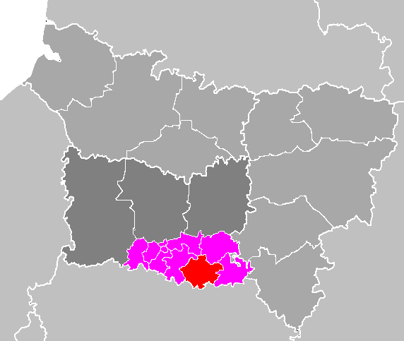 Maps of arrondissements and cantons of France: Département de l'Oise